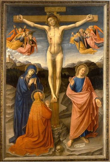 Donato de' bardi, crocefissione di savona